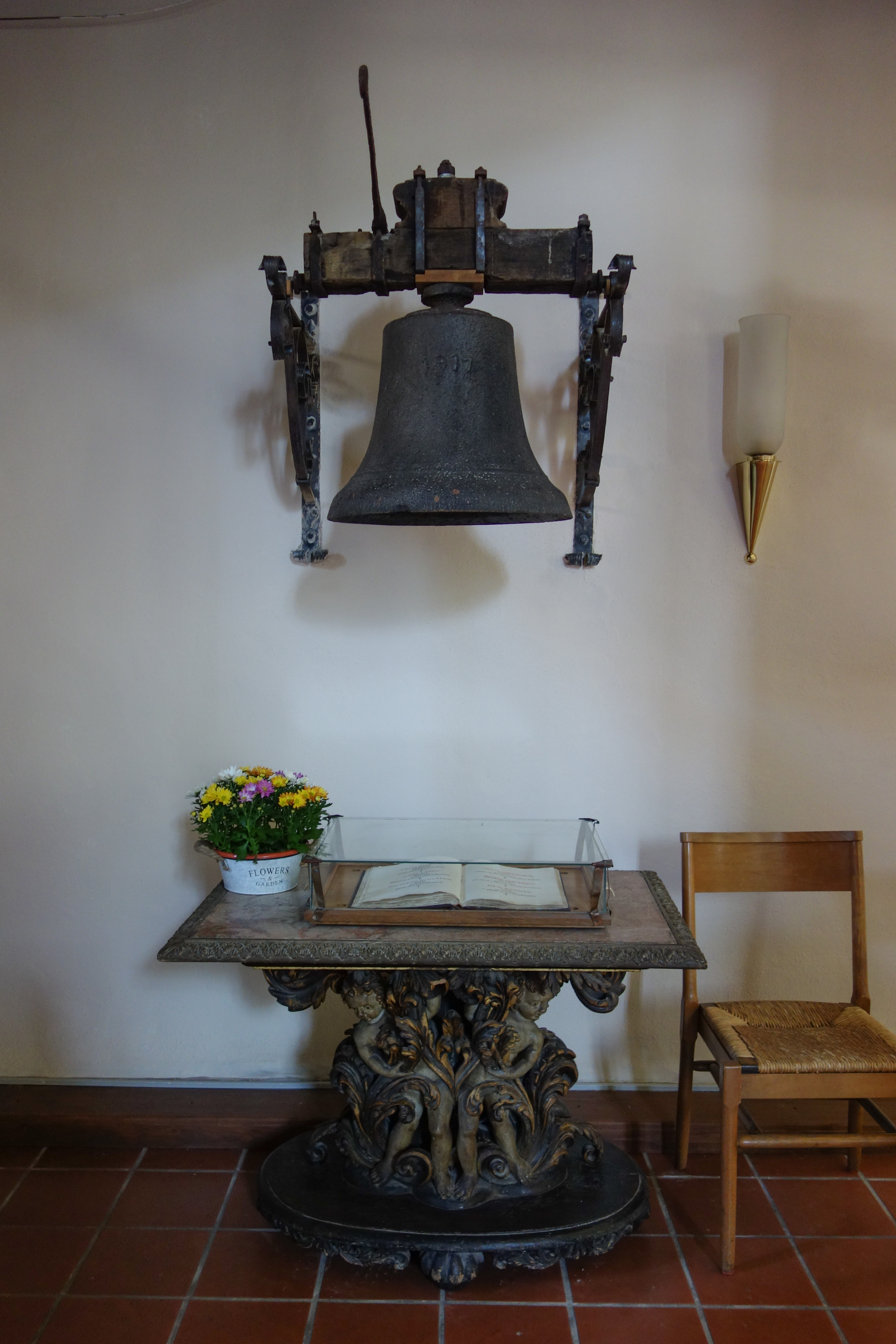 St.-Salvatoris-Kirche in Zellerfeld - ehemalige Bergmannsglocke von 1917, darunter der Barocktisch aus dem Nachlass von Calvör